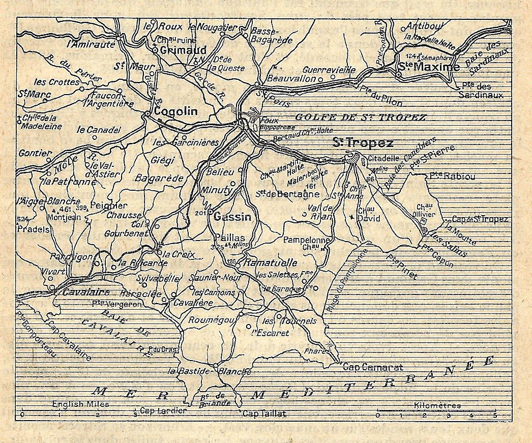 Carte de la Provence (1921) : Saint-Tropez, environs.